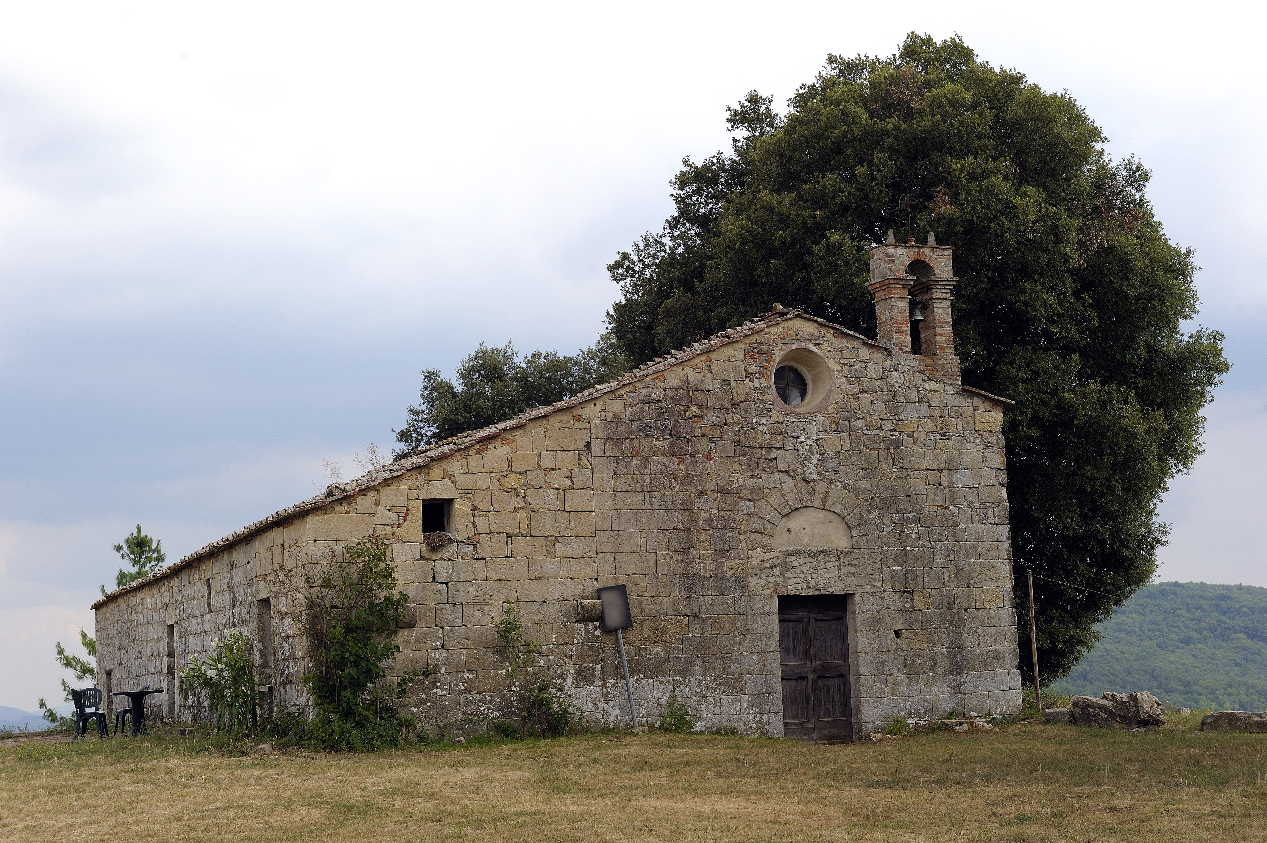 Chiesa di Santa Maria in Colle (la Badiola), Radda in Chianti